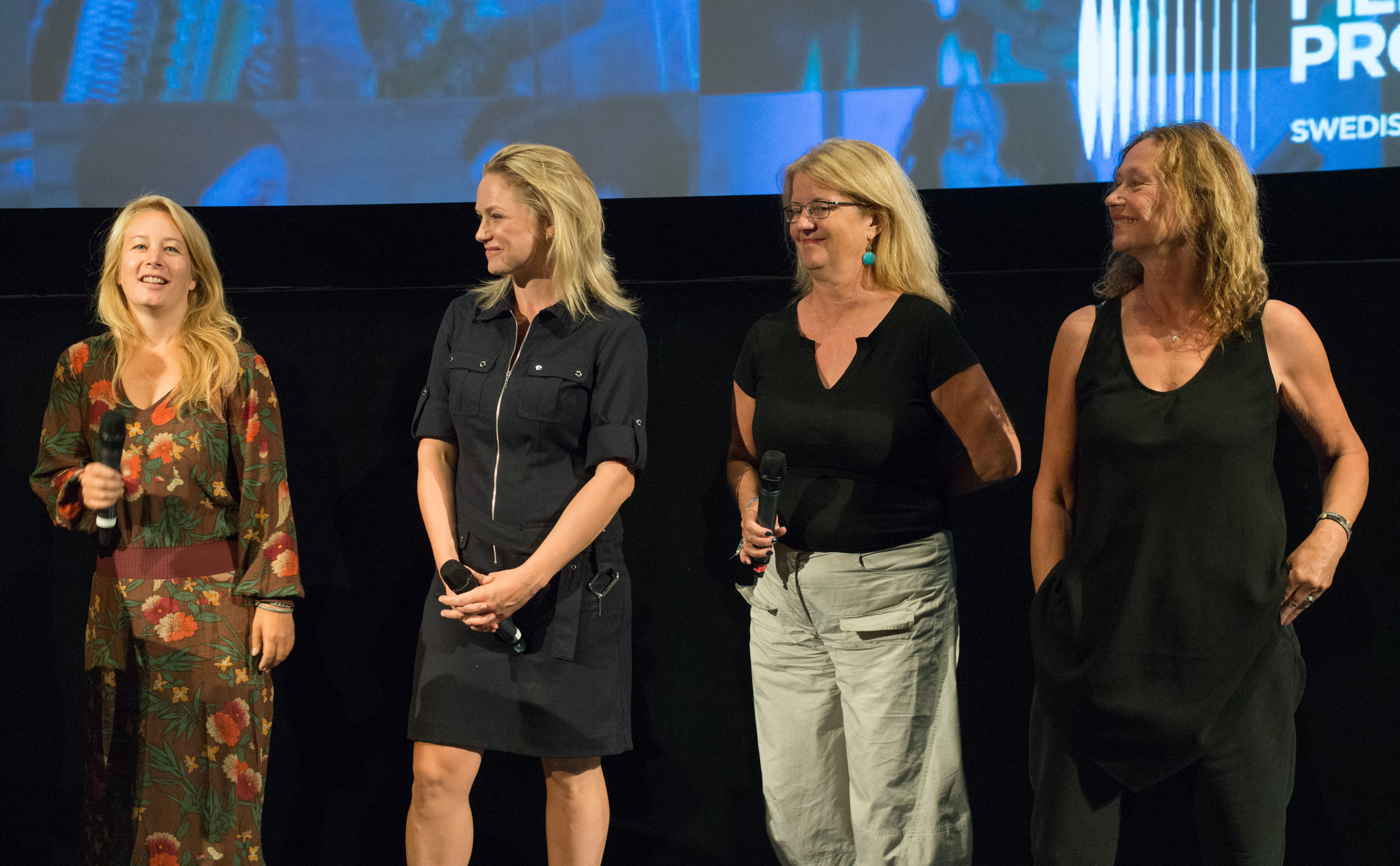 Medarbetare från filmen Flocken under presentationen av den Svenska filmhösten i Filmhuset i Stockholm den 17 augusti 2015.